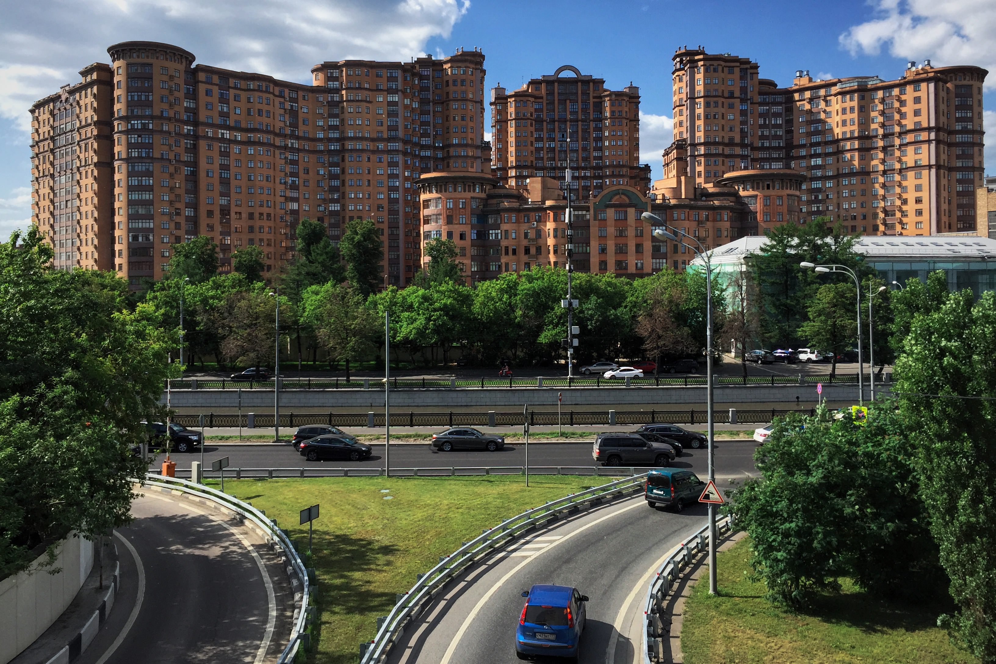 Красноказарменная набережная (передний план), набережная академика Туполева, ЖК "Каскад" (академика Туполева 15).